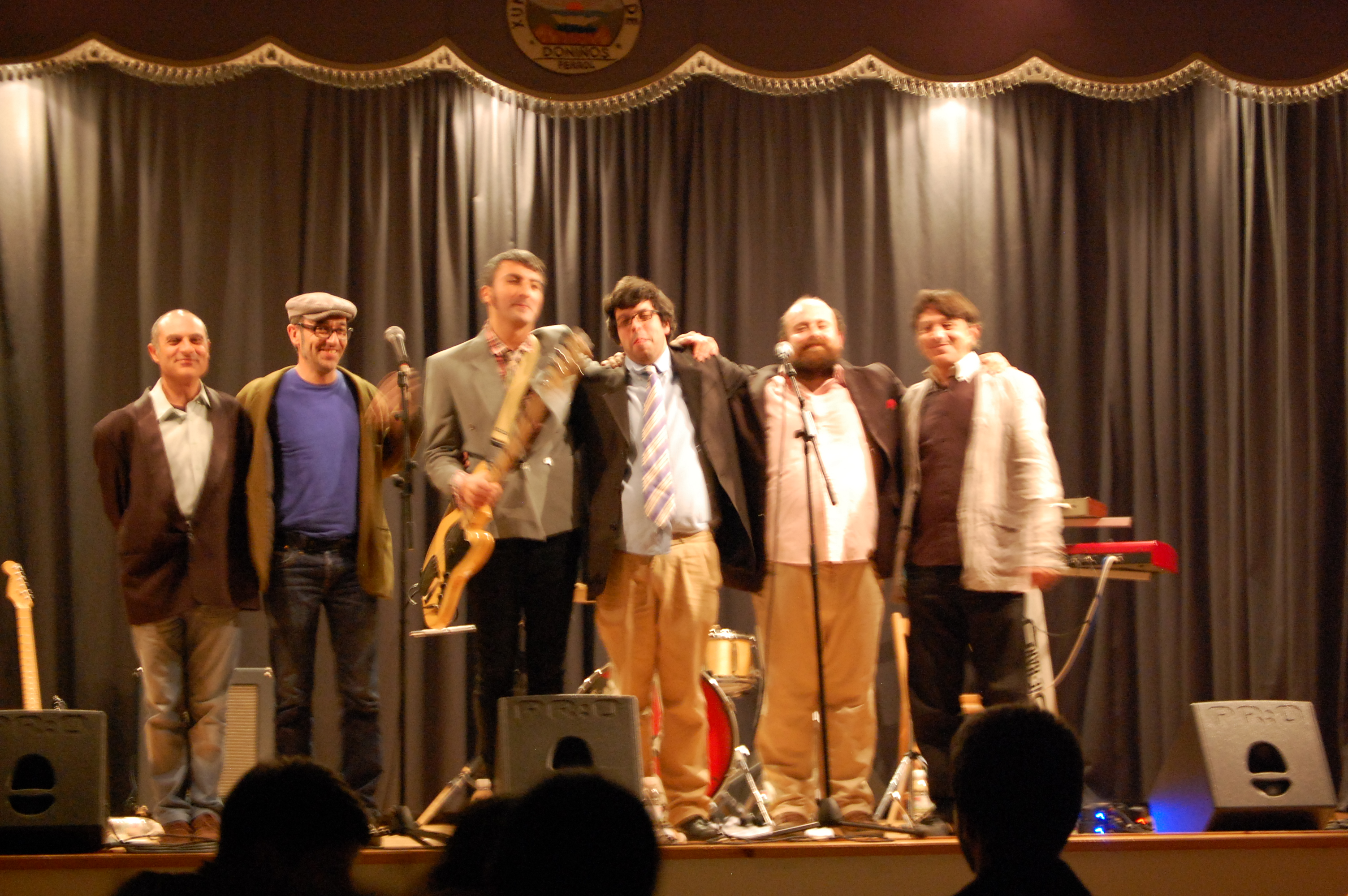 Os da ria